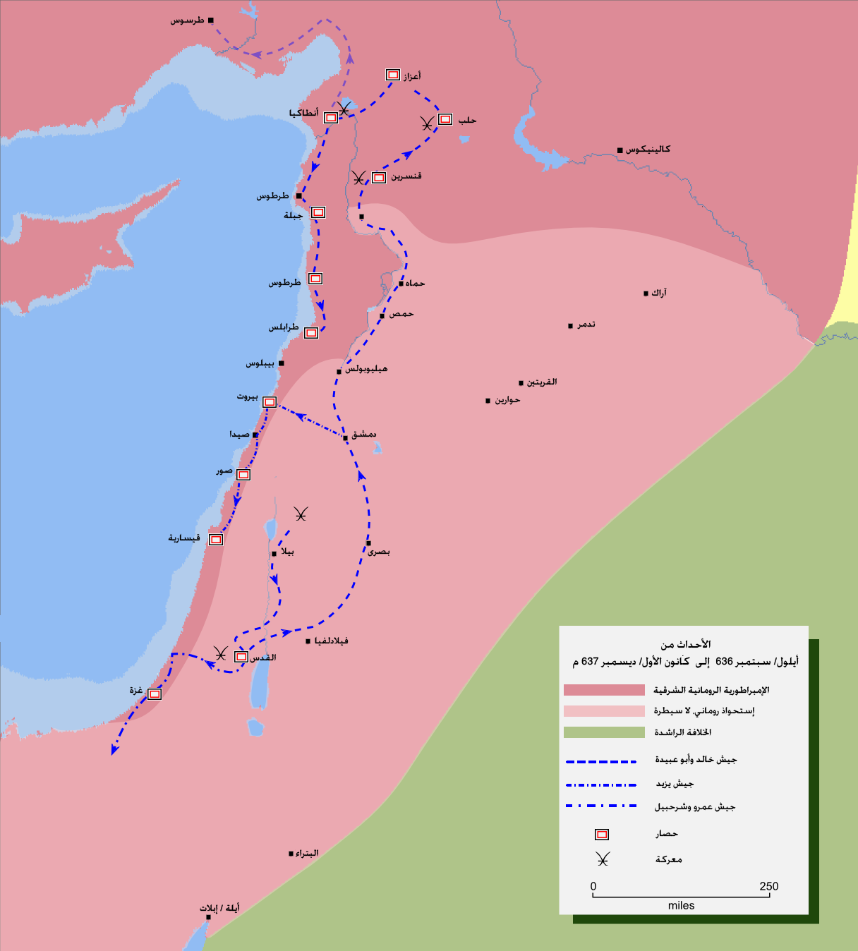 الفتح الإسلامي لبلاد الشام بين عاميّ 636 و 637 م